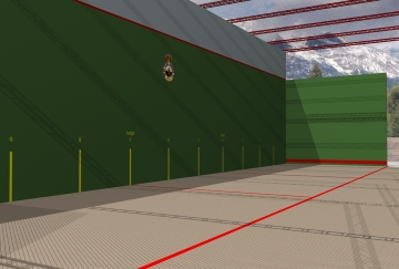 Cancha de frontenis